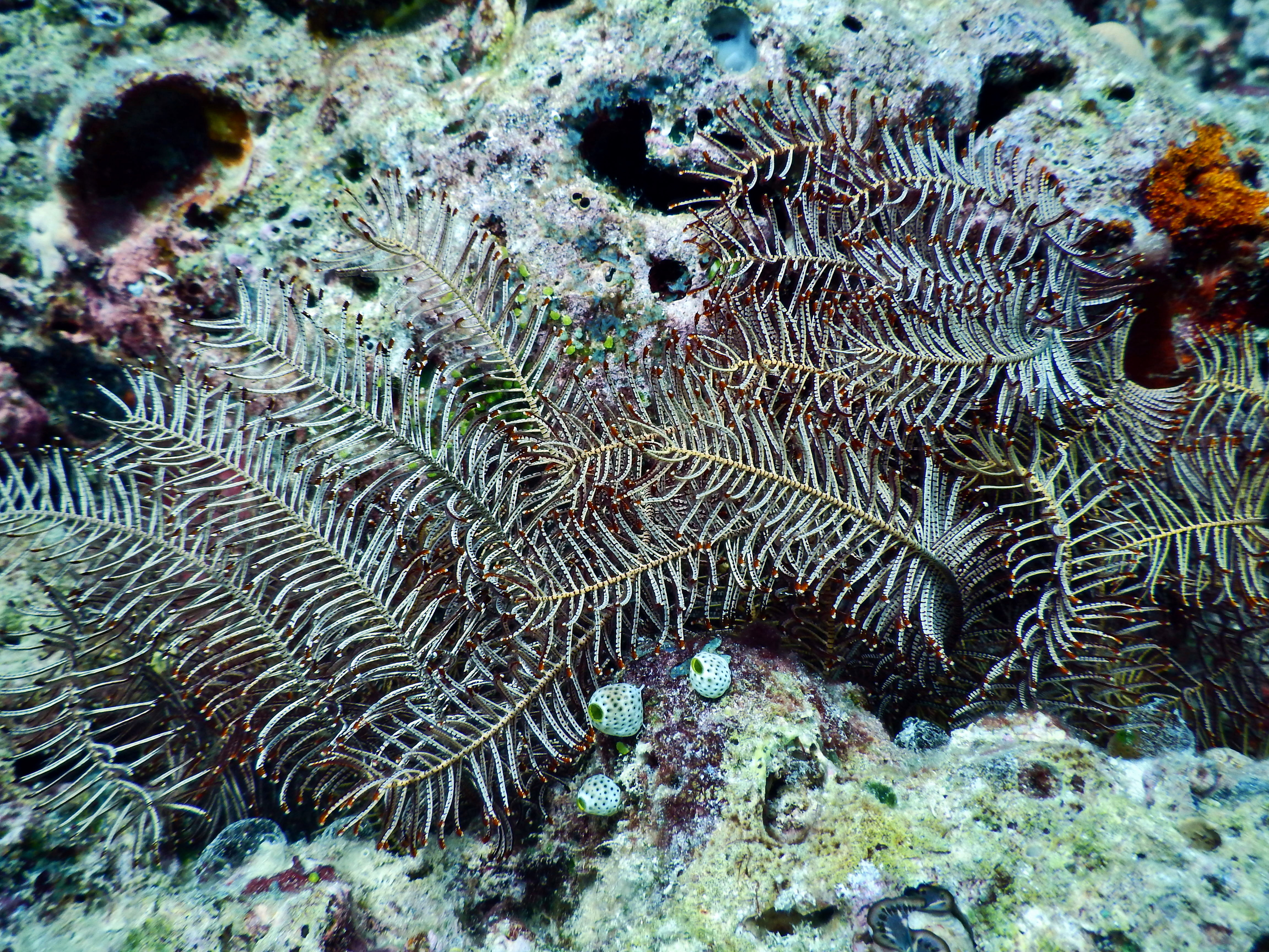 Une comatule Clarkcomanthus mirabilis aux Maldives (Milhadhoo, atoll de Baa).